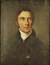 Ritratto del marchese Agostino Lascaris di Ventimiglia, dipinto nel 1850 circa dall'artista Luigi Fognola